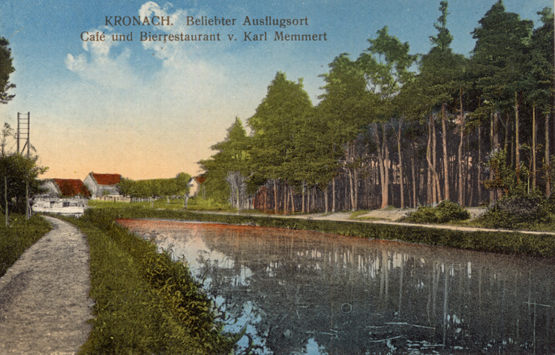 KRONACH. Beliebter Ausflugsort - Café und Bierrestaurant v. Karl Memmert. Postkarte, datiert Juni 1915. Der Ludwig-Donau-Main-Kanal südwestlich von Kronach bei Fürth. Westlich vom alten Ortskern von Ronhof machte das Kanalbett einen Bogen um ein erhöhtes Dünengebiet, das man heute trotz Wohn- und Straßenbebauung teilweise noch erkennt. Vor dem auf der Postkarte abgebildeten heutigen Gasthof Weigel in Kronach wurde der Kanal in den 1960er Jahren vom Frankenschnellweg A 73 überbaut. Die heutige Kronacher Straße führte über eine Bogenbrücke einst tatsächlich nach Kronach.